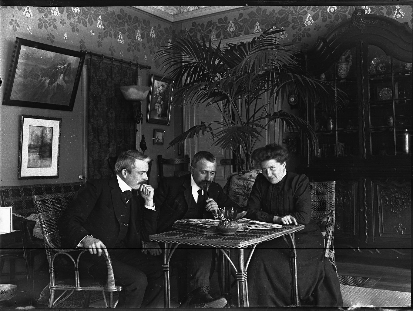 Antonin et Marguerite Daum avec Louis Sencert (chirurgien, gendre d'Auguste Daum). Photographie prise autour de 1910, probablement par Jean Daum. Cette photo appartient à un fond de plaques photographiques de la famille Daum, prises avec un appareil photographique appartenant à Antonin Daum. SVP, veuillez citer l'origine. Pour toute information, contacter Pierre de Lyon